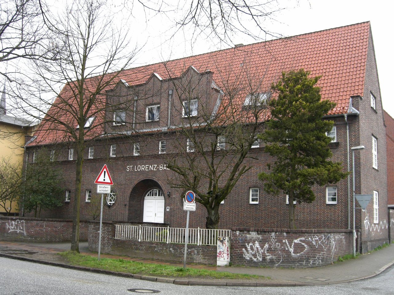 Warmbadeanstalt Lübeck, Virck 1926 selbst aufgenommen